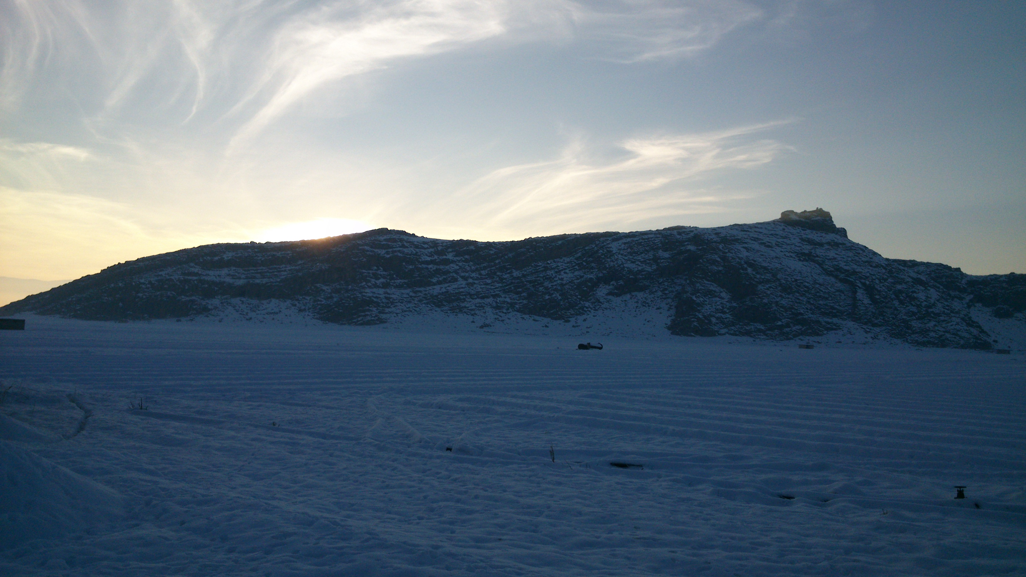 زمستان در روستای بانش